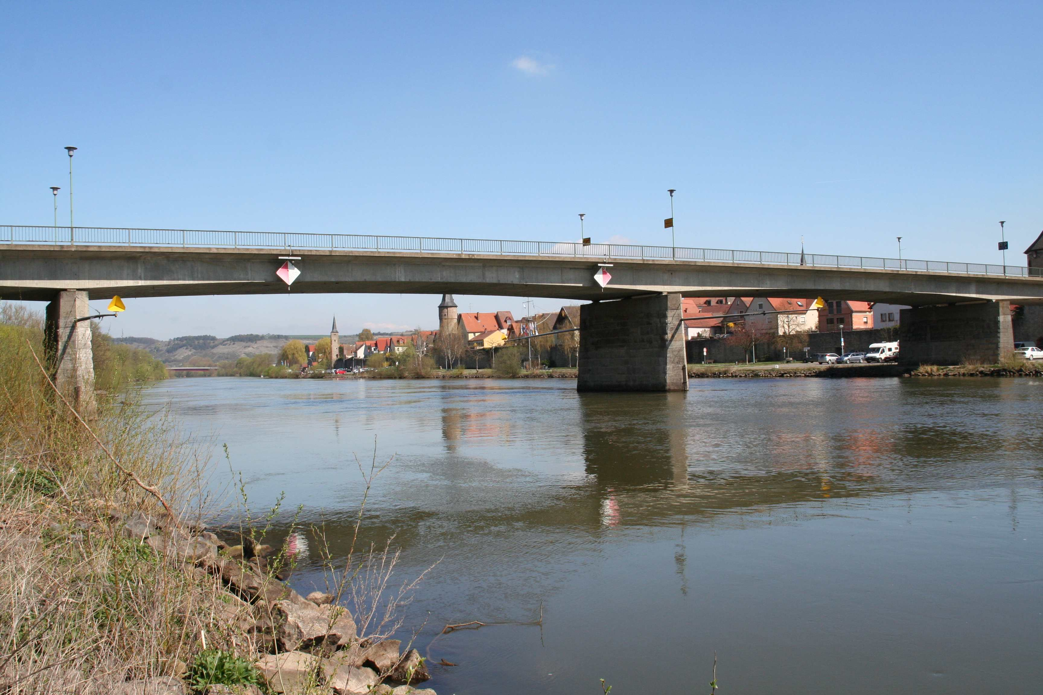 Alte Mainbrücke Karlstadt, Karlstadt am Main, Main-Spessart-Kreis, in Unterfranken